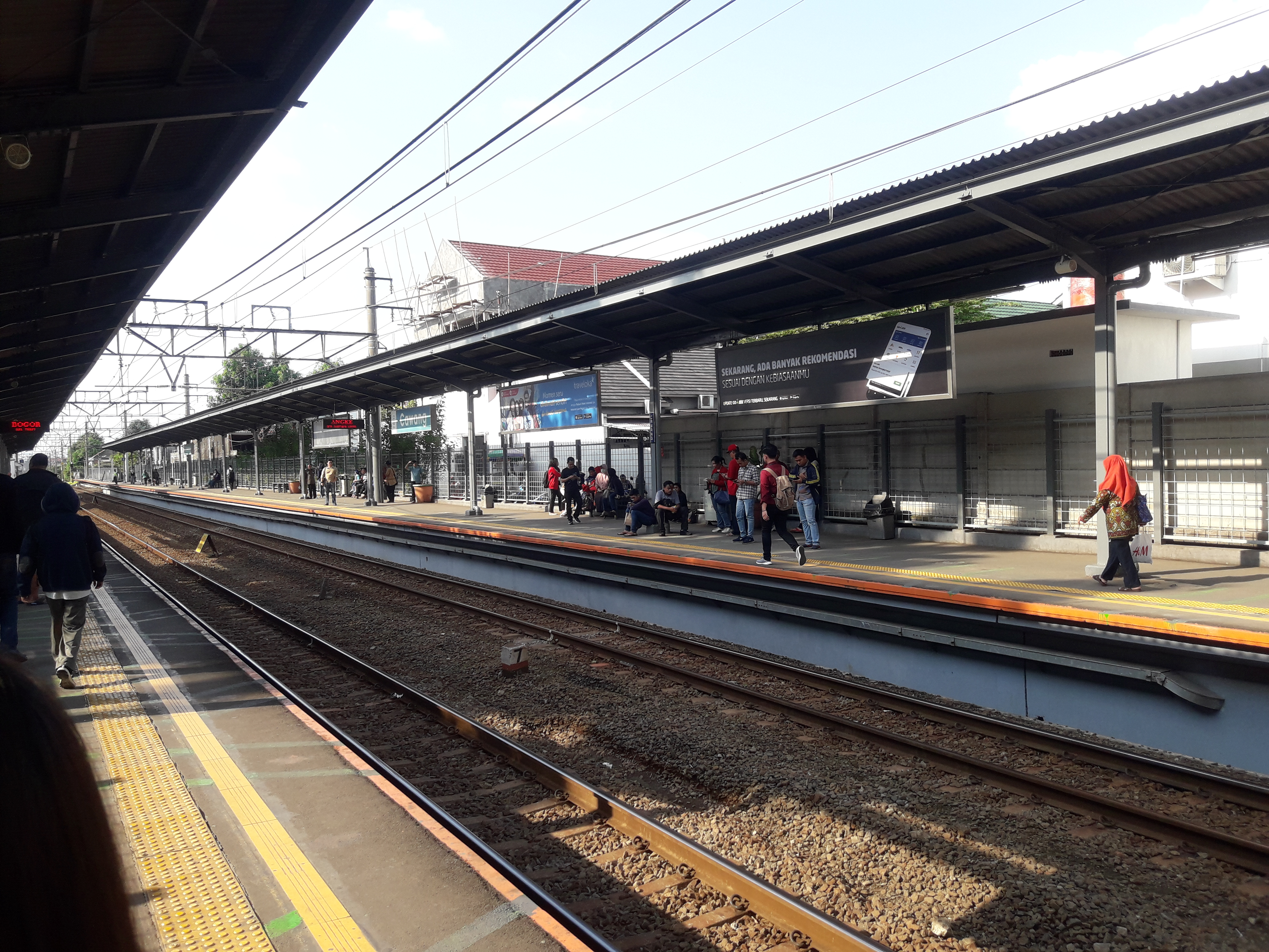 La station de Cawang